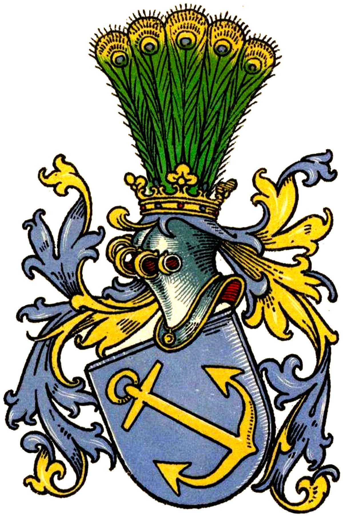 Stamm-Wappen der Grafen von Lingen